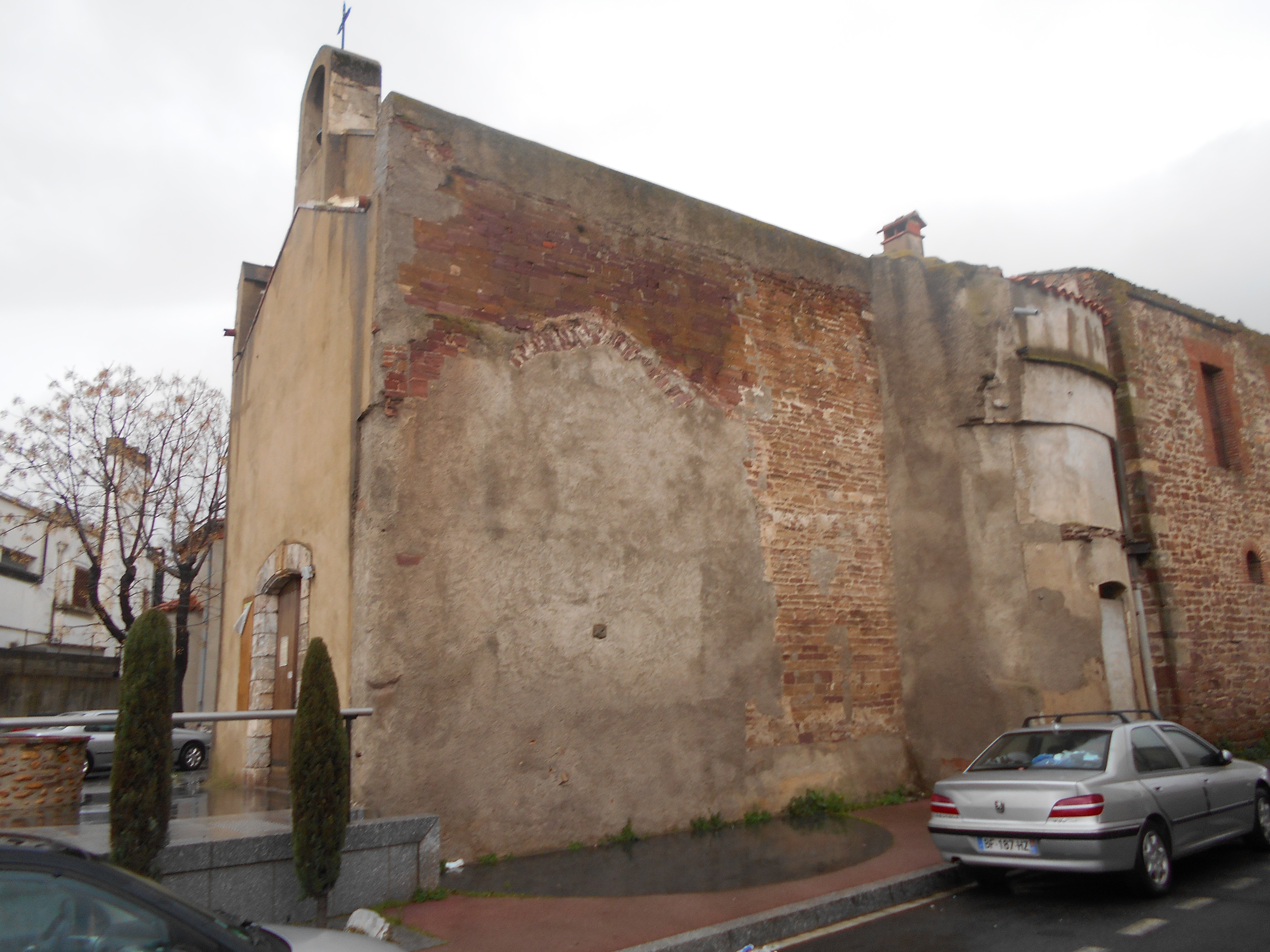 Façaaa oriental i mur nord de l'església de Sant Cristòfol del Vernet